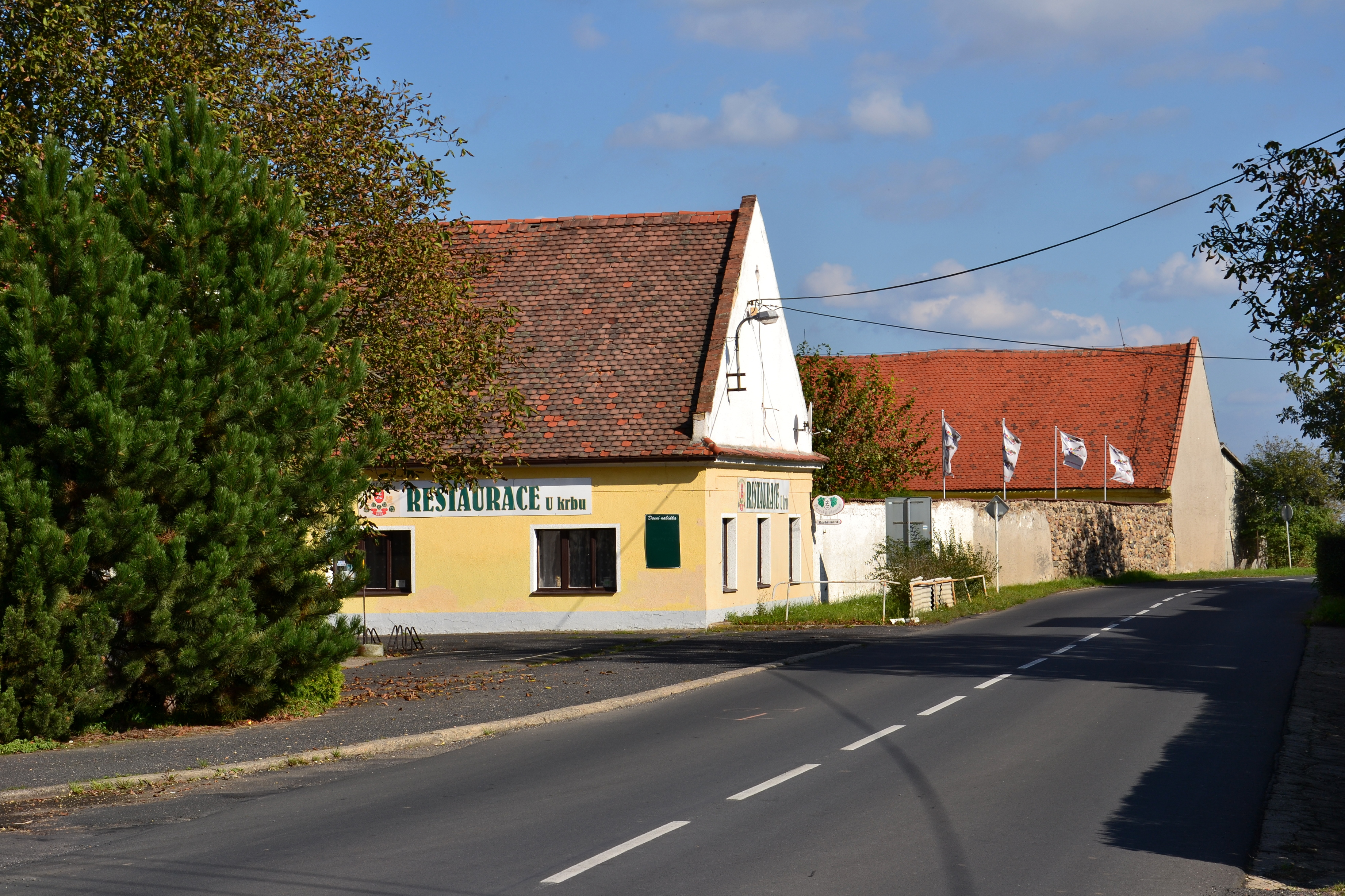 Vikletice - domy u silnice z Kadaně do Žatce